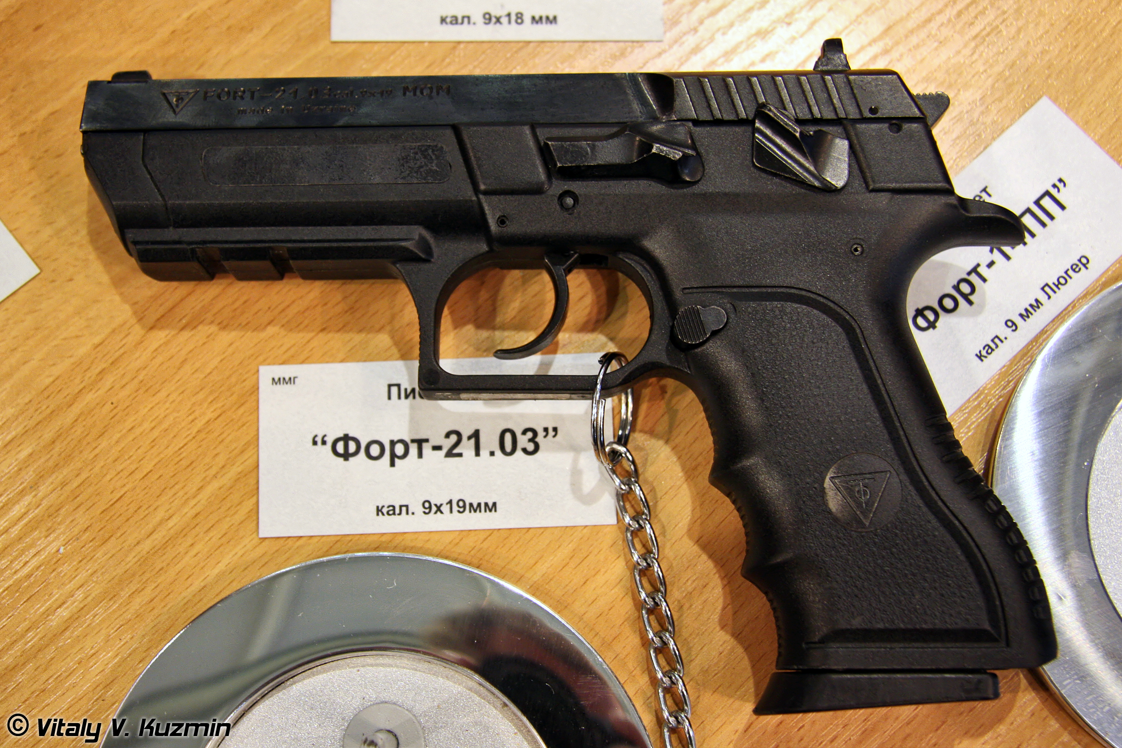 Форт-21.03 (Fort-21.03)